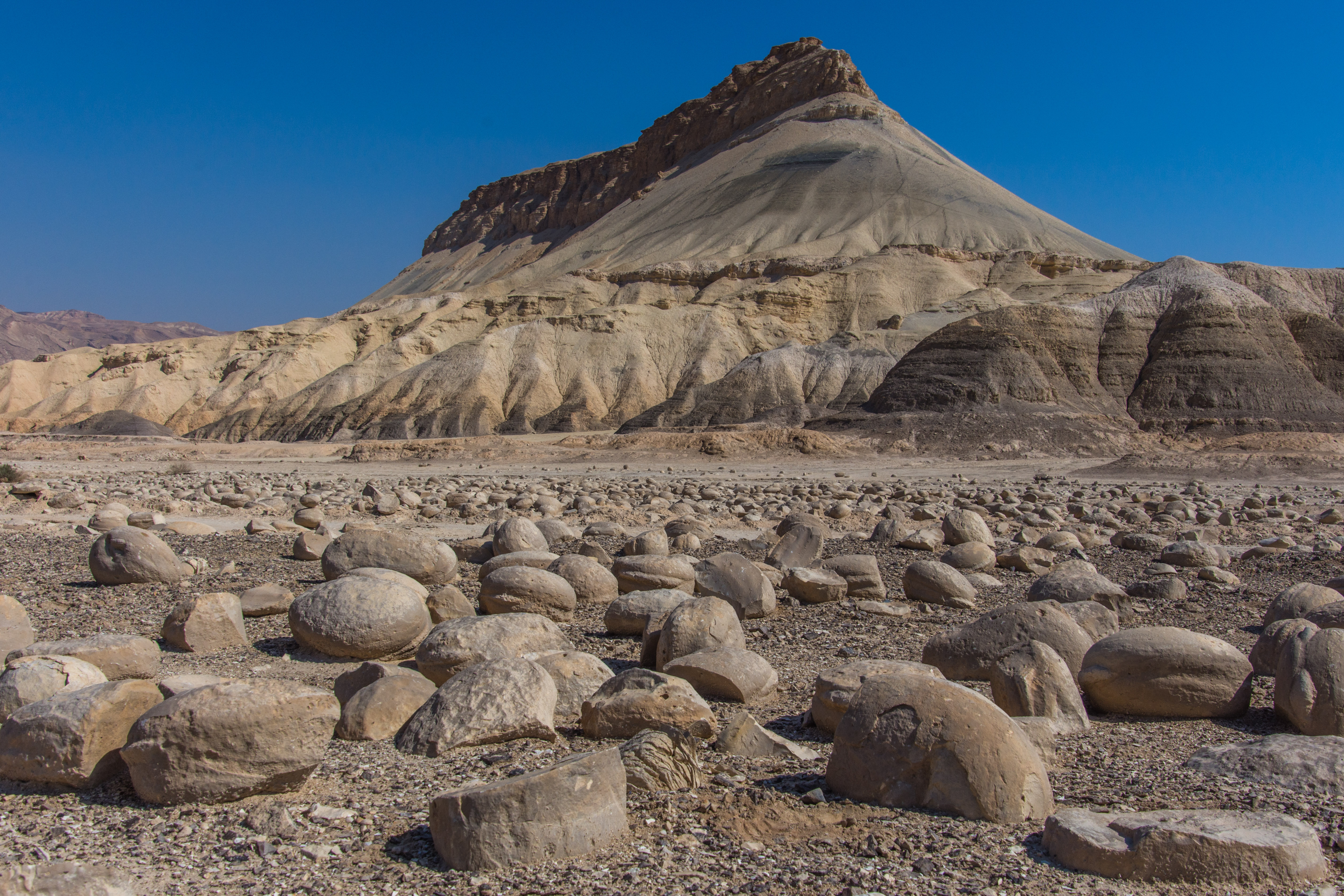 הר הנגב הוא אזור הררי בנגב, שיא גובהו 1,037 מטר בהר רמון, הפסגה הגבוהה ביותר בדרום מדינת ישראל. באזור נמצאת העיירה מצפה רמון, בגובה 850 מ' מעל פני הים. האקלים ששורר שם הוא חם ביום וקר מאוד בלילה (הטמפרטורות יורדות בו בחורף לעתים קרובות אל מתחת ל-0) ויבש (ממוצע המשקעים הוא 86 מילימטרים לשנה). שלג יורד בו כפעם בשנה ולעתים אף יותר. באזור אין נחלי איתן; נחלי האכזב הבולטים שם הם נחל צין (השני בגודלו בנחלי האכזב בארץ, שנשפך אל ים המלח), נחל רמון (המנקז את מכתש רמון ונשפך לנחל נקרות), ונחל נקרות (שנשפך לנחל הערבה).